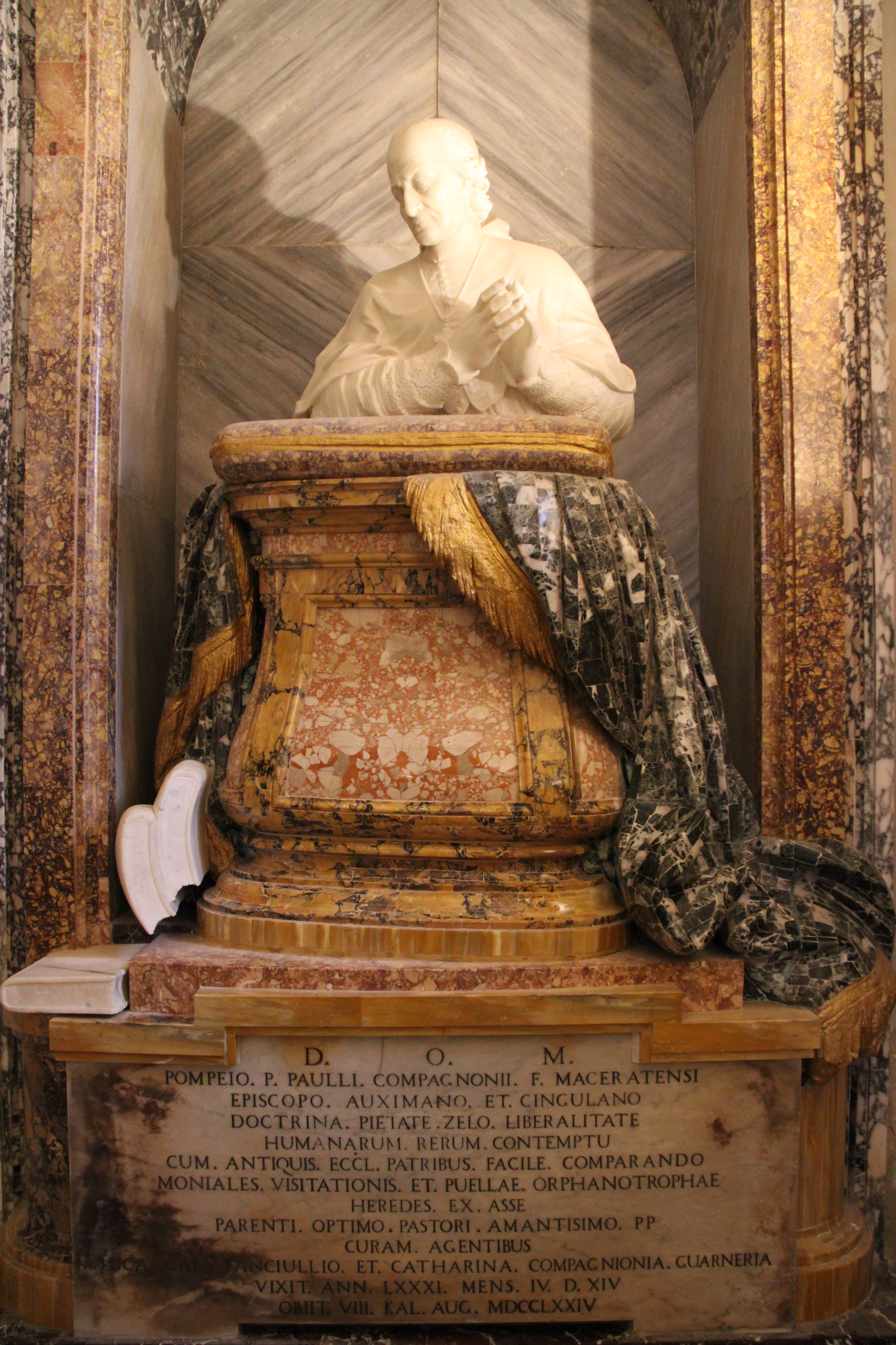 Concattedrale di San Leopardo (Osimo), Cripta, Monumento a Pompeo Compagnoni